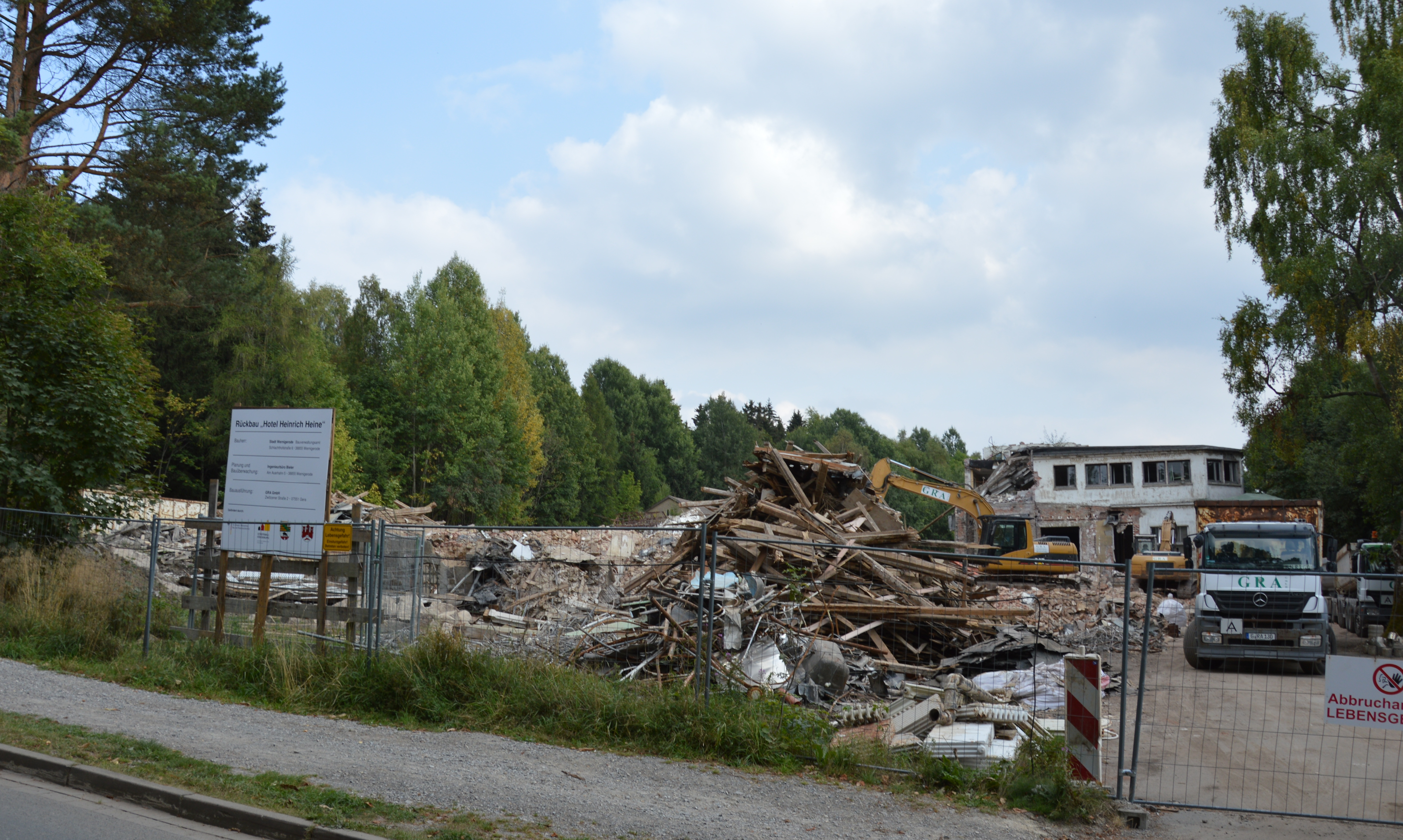 Abbrucharbeiten Hotel Heinrich Heine